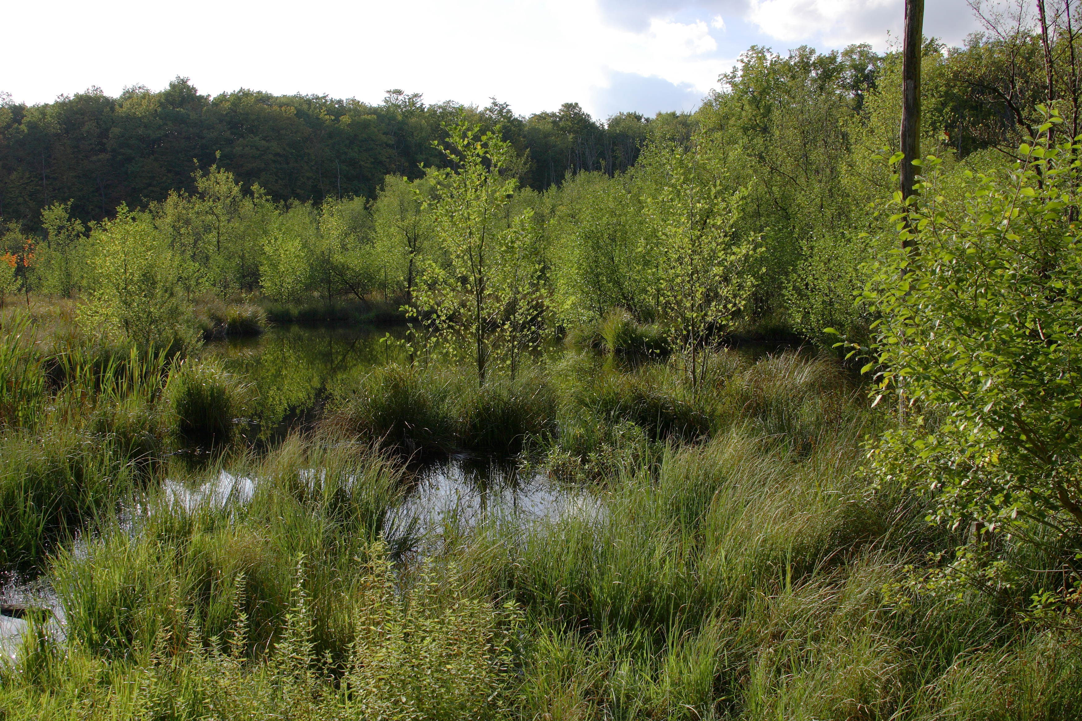 Blutsee im Herbst